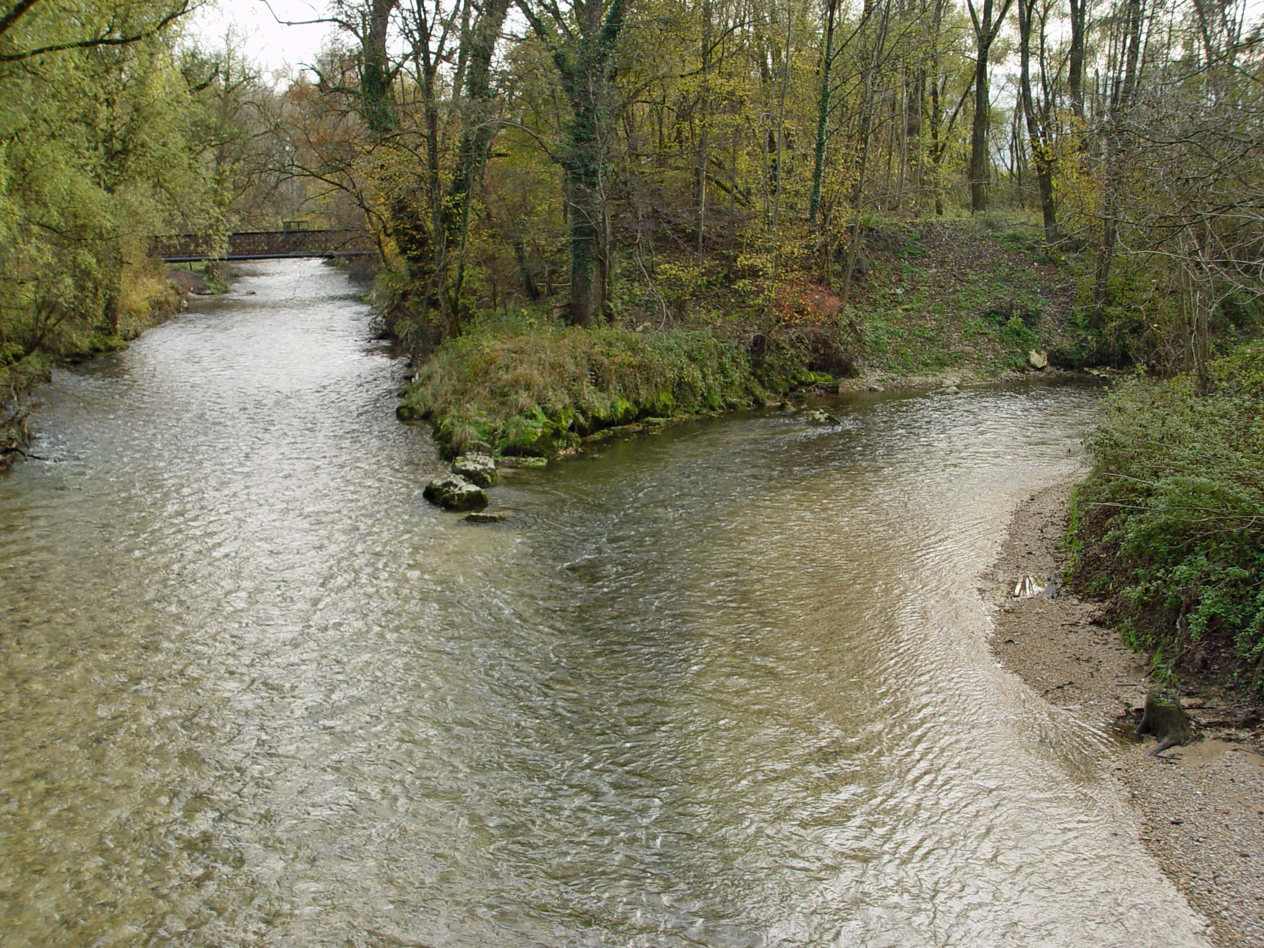 Einmündung von La Sorne in die Birs bei Delemont